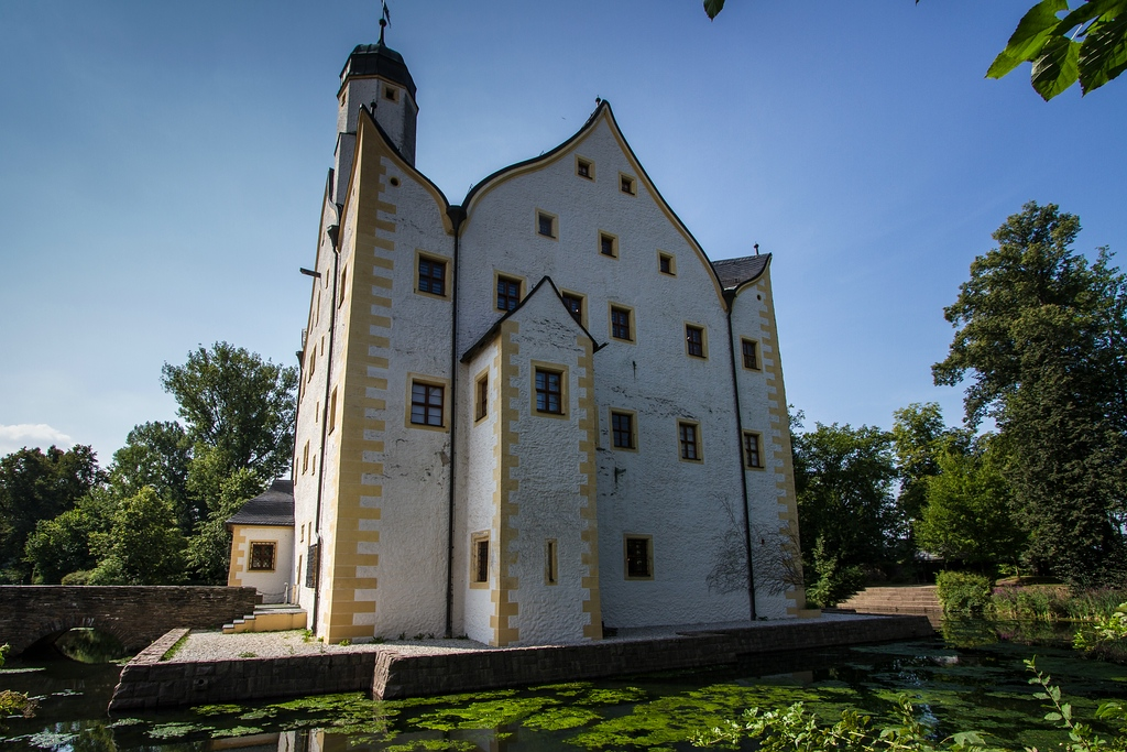 Chemnitz, Wasserschloß Klaffenbach